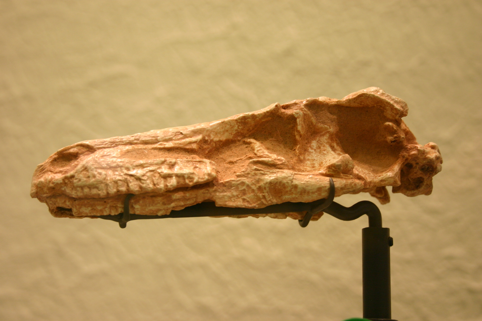 Holotype AMNH 6516. Birdlike reptile Visit my blog at